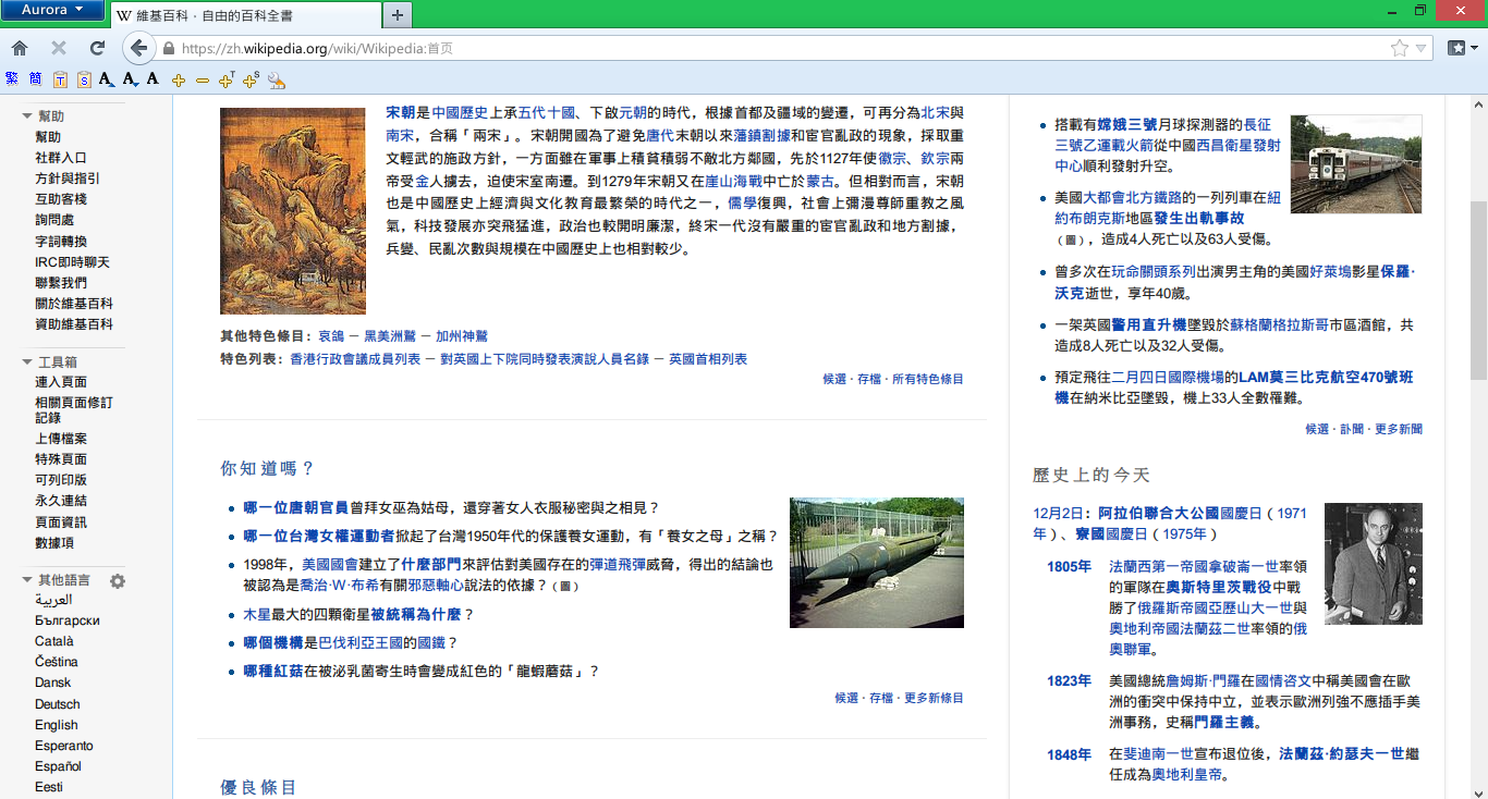 中文（台灣）: 新同文堂會在 Firefox 書籤工具列下方新增一條工具列，方便將網頁轉換為繁體/簡體